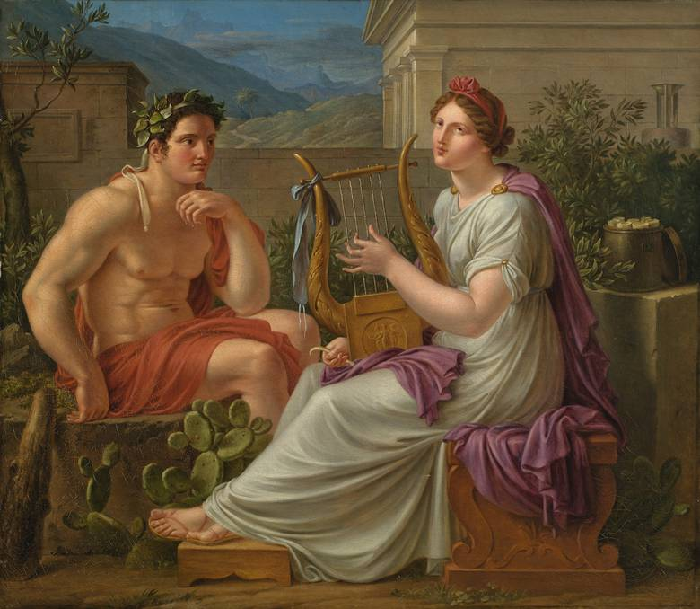 Herkules und die Muse, Um 1805/10. Öl auf Leinwand. 74 x 85 cm